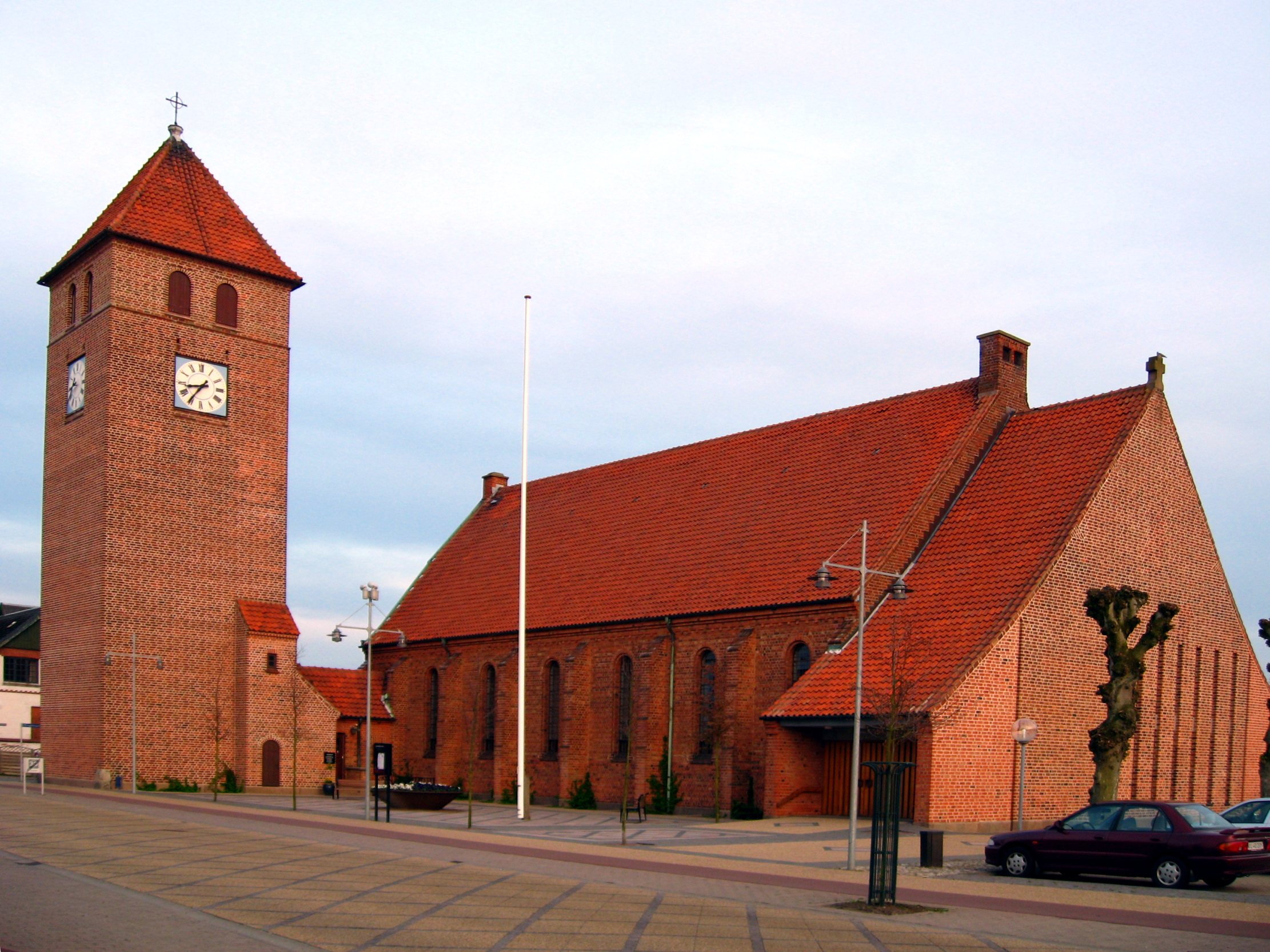 Brønderslev Kirke